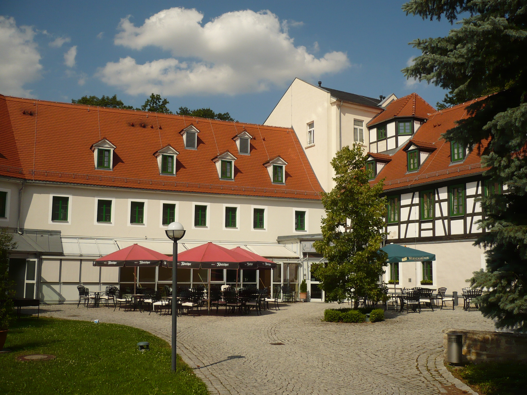 Schloss Schweinsburg in Neukirchen/Pleiße